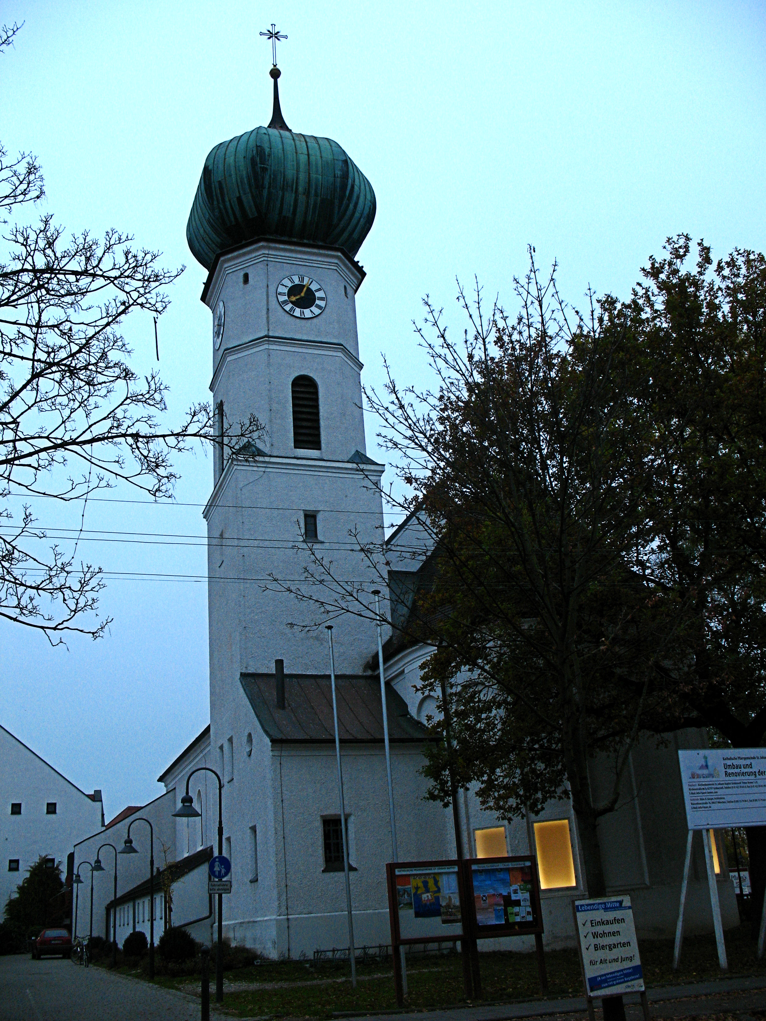 Deutschland, Bayern, Gröbenzell, St. Johann Baptist